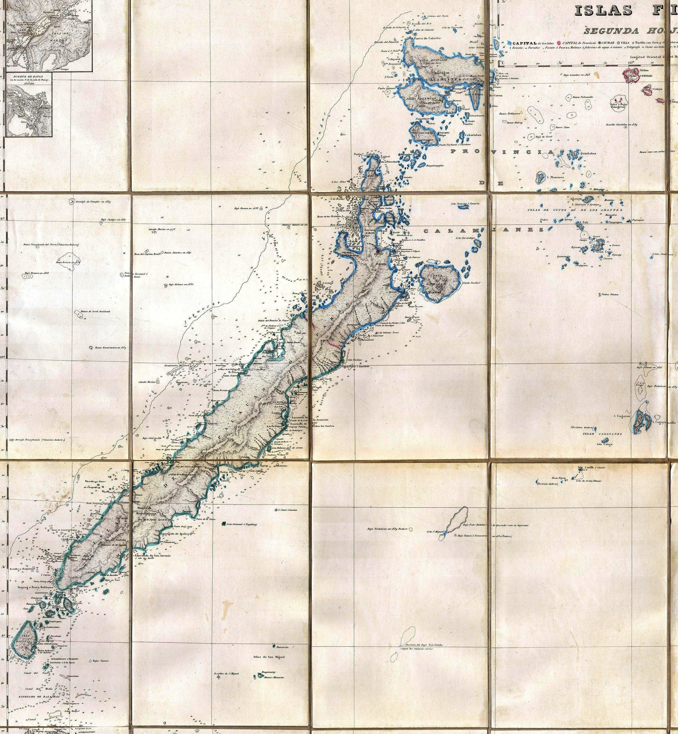 Islas Filipinas, Segunda Hoja Central, fragmento del Morata y Francisco Coello de 1852